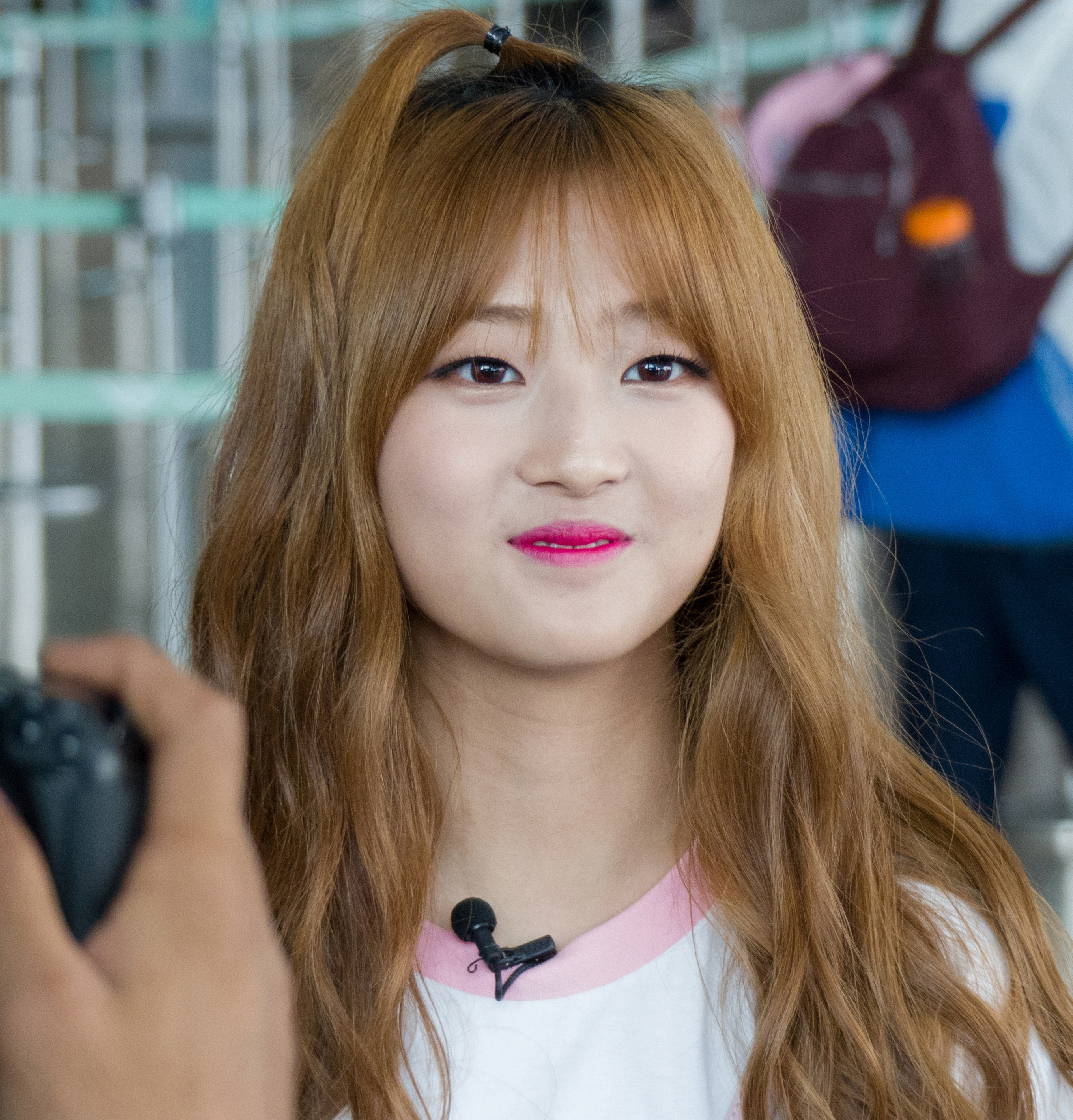 160922 아이비아이 한혜리 @ 인천공항 출국&헬로 아이비아이 촬영